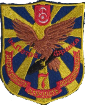 Нарукавний знак 7-ї бригади тактичної авіації